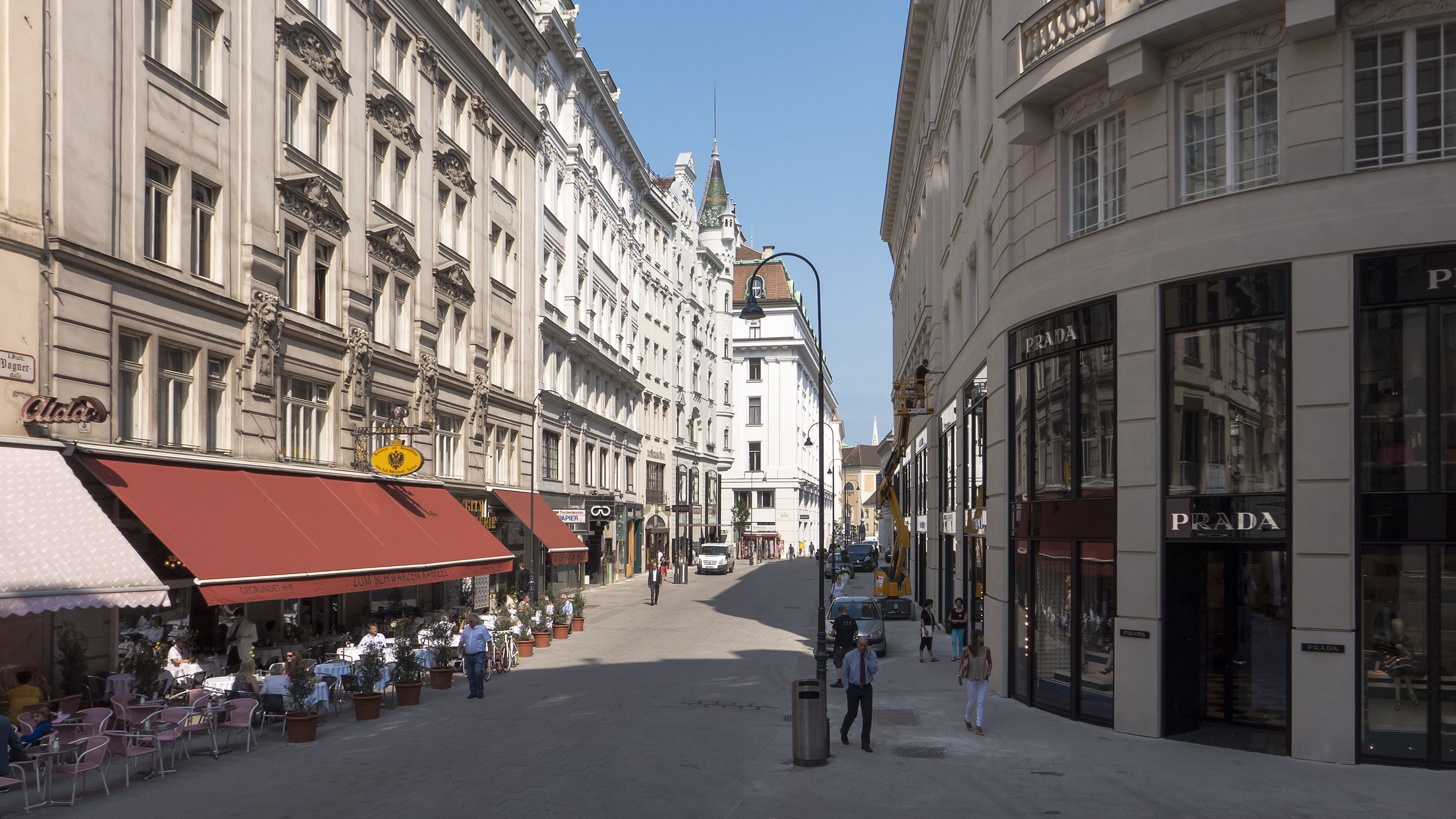 Bognergasse in Wien 1 bei Nr. 2 Richtung Nordwesten